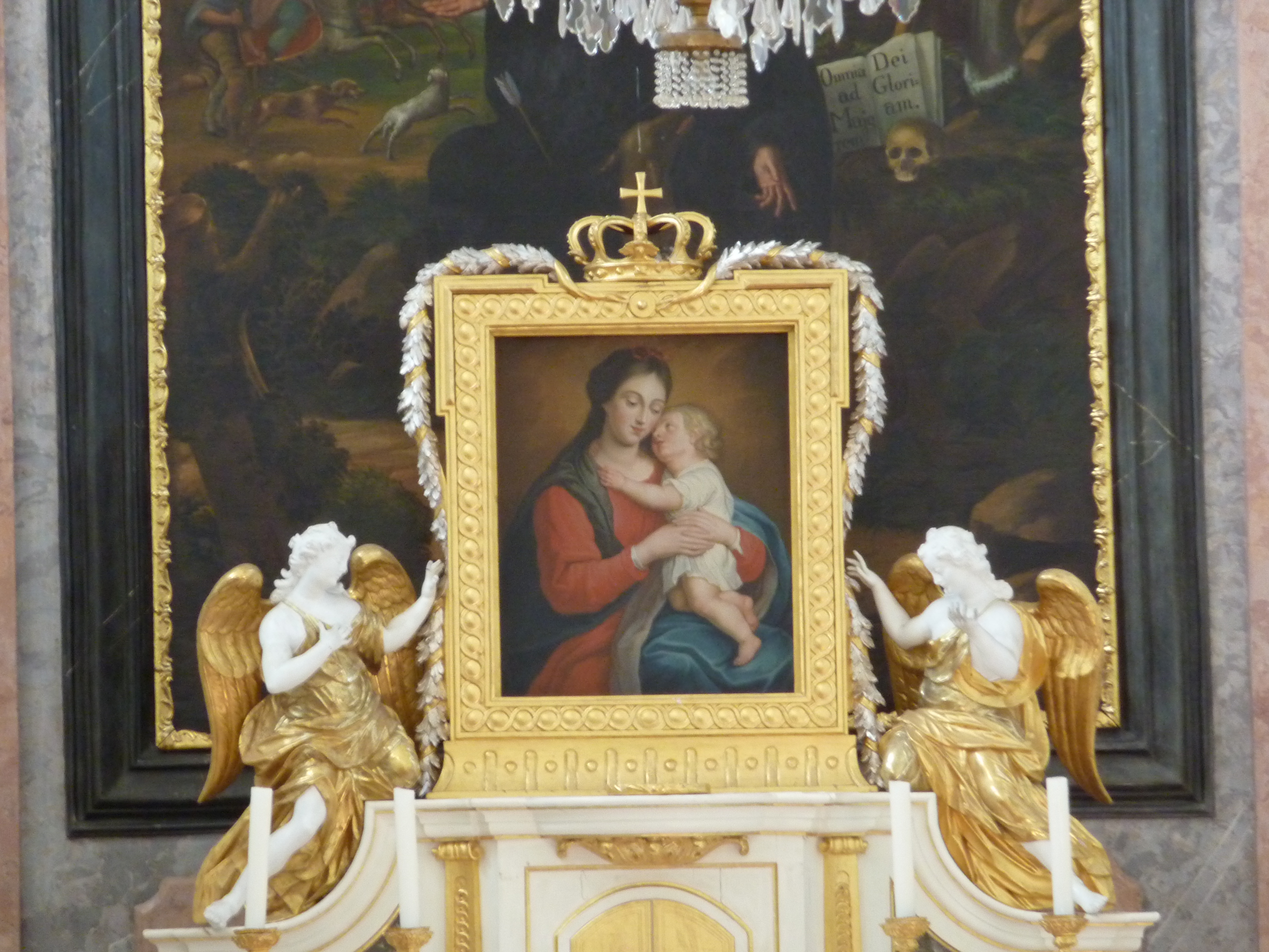 Pfarrkirche, Wallfahrtskirche hl. Ägydius, Groißenbrunn, Engelhartstetten, Niederösterreich - Gnadenbild (Kopie des Wiener Mariahilfbildes)